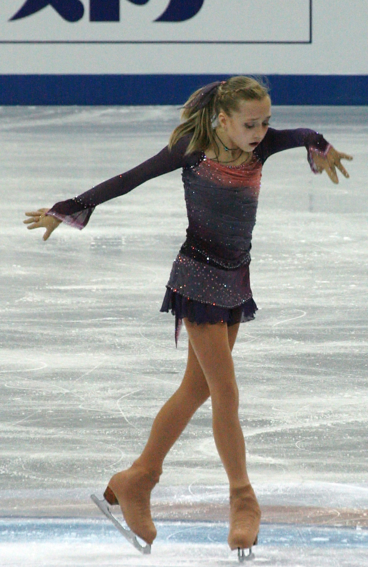 Елена Родионова (Россия) на финале Гран-при среди юниоров 2012-2013. Произвольная программа.